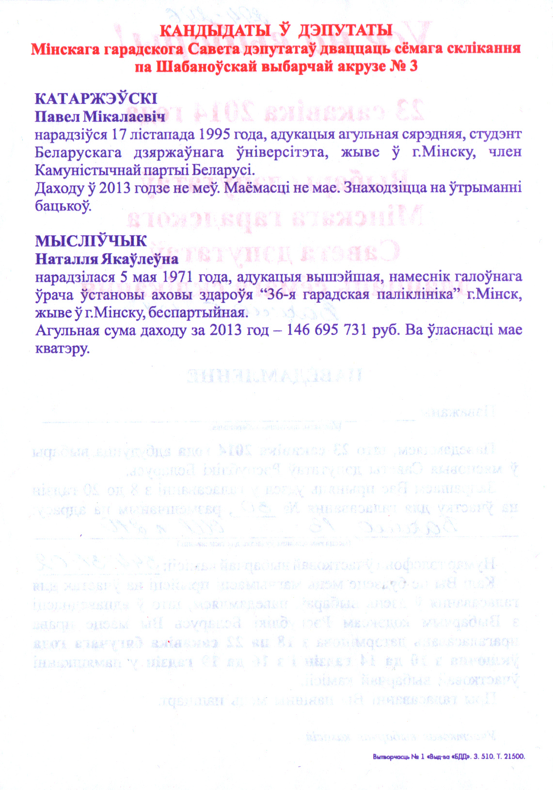 Приглашение на местные выборы в Беларуси в 2014 году, рассылаемое по почте. Список кандидатов по Шабановскому избирательному округу №3 города Минска